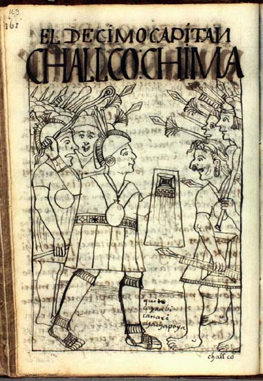 Chalcochima "EL DECIMO CAPITAN / CHALLCO CHIMA / quito, cayanbi, cañari, sachapoya"